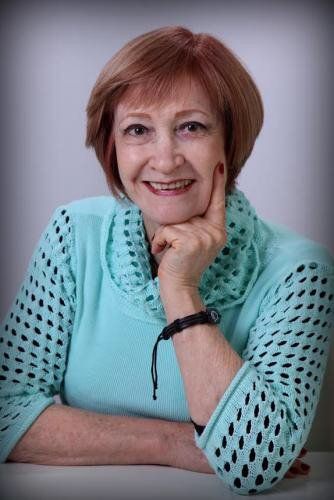 רעיה אדמוני